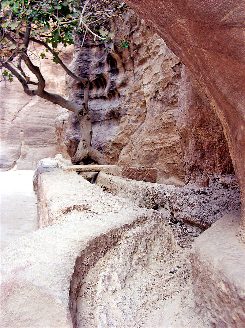 Canal de transport des eaux le long du Siq, avec un échantillon de pierre qui le recouvrait.